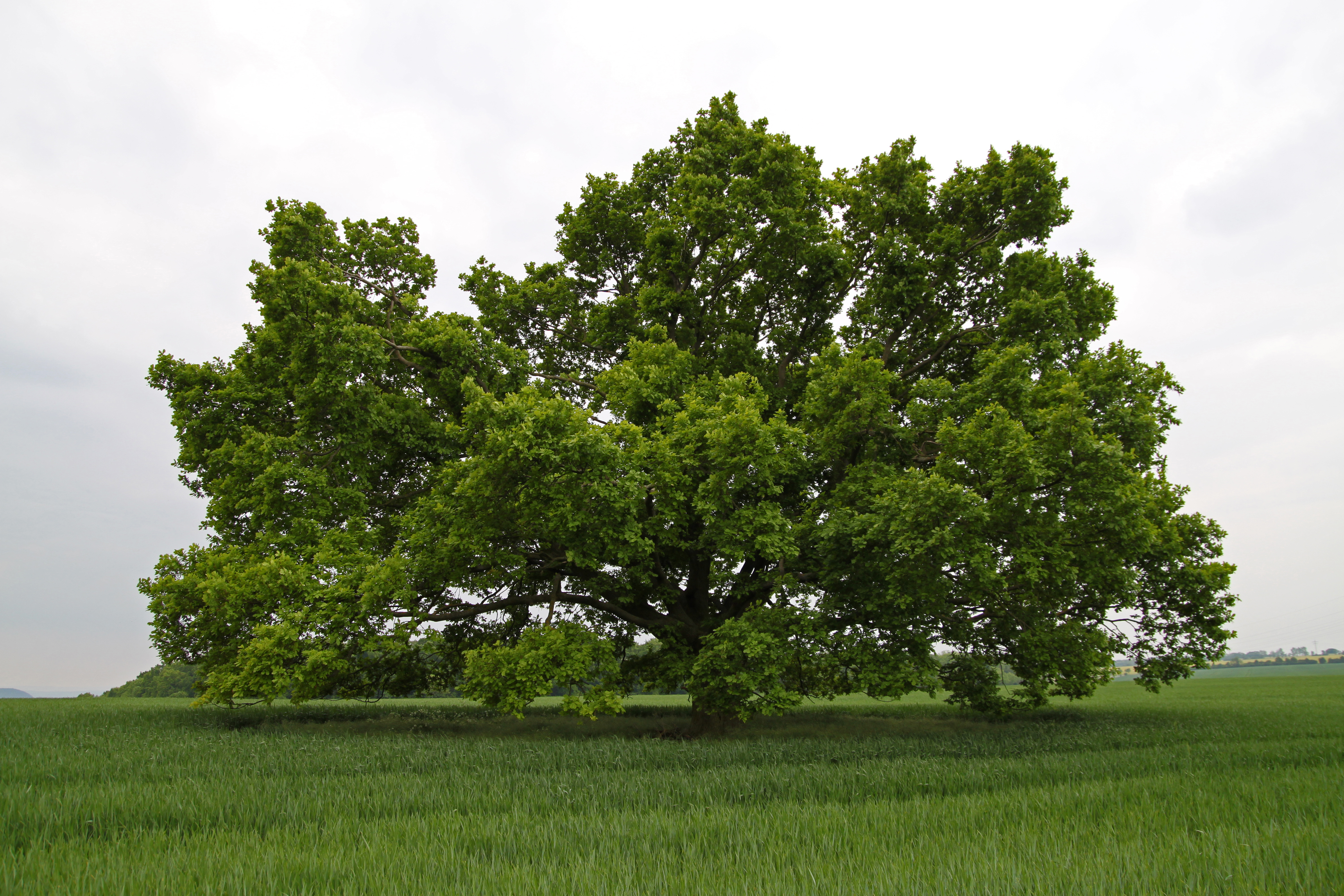 Jena Naturdenkmal Traubeneiche Closewitz